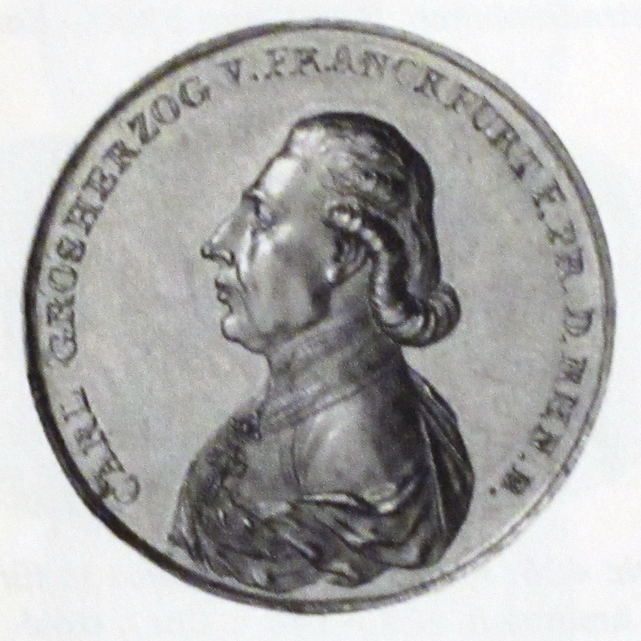 Karl Theodor von Dalberg (1744-1817), 10 Dukaten (1810) auf seine Ernennung zum Großherzog von Frankfurt